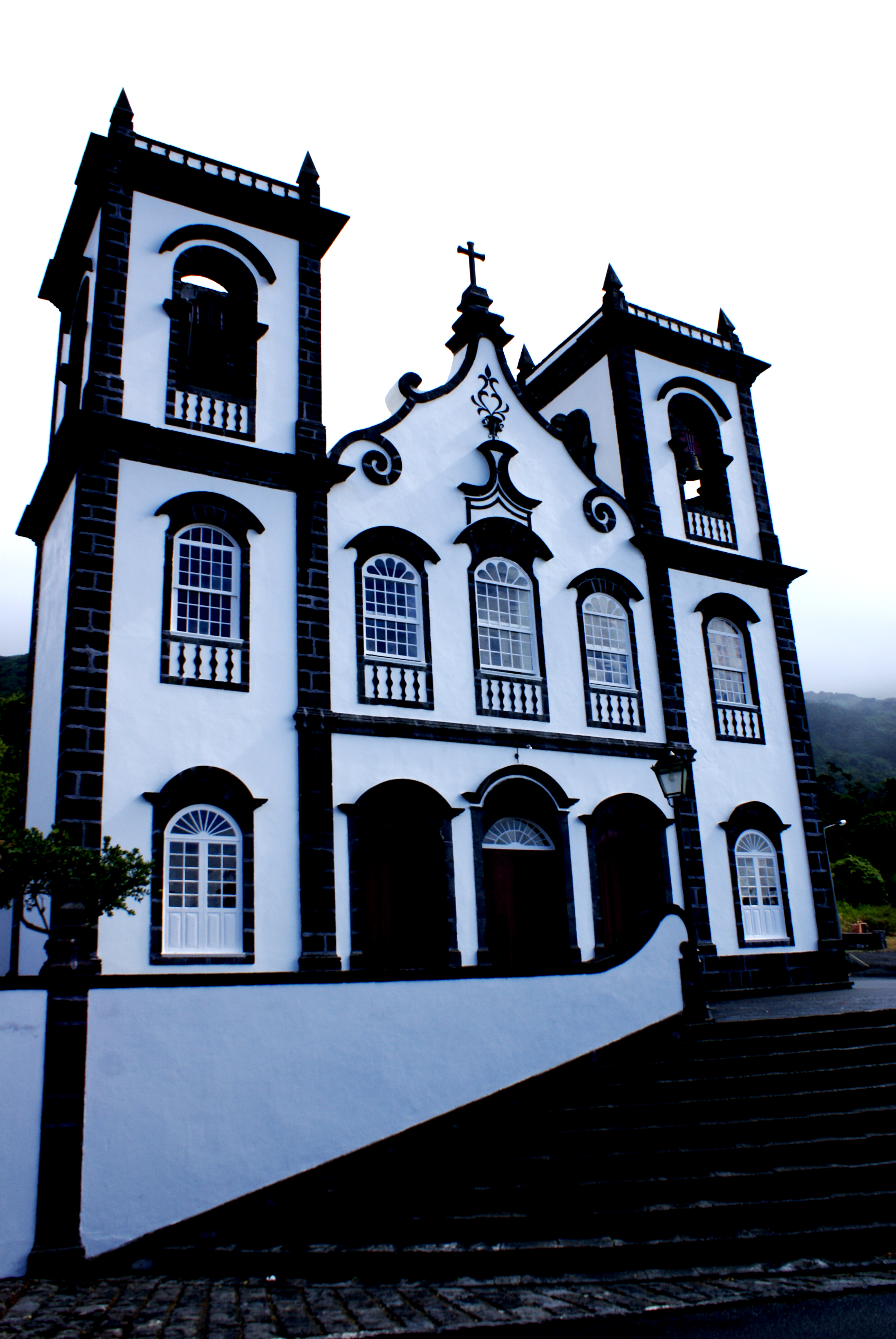 Front façade of the Church of São Mateus, Urzelina, Velas, São Jorge (Azores), Portugal